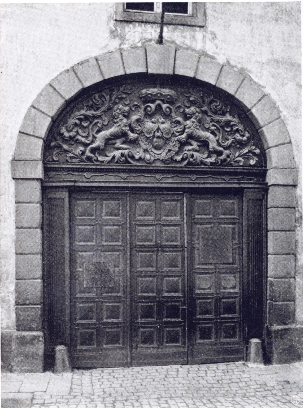 Tor Akademiestraße 1